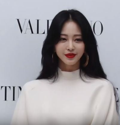 배우 한예슬, 김사랑과 박민영이 5일 오후 서울시 성동구 성수동의 한 매장에서 열린 브랜드 행사에 참석했다.